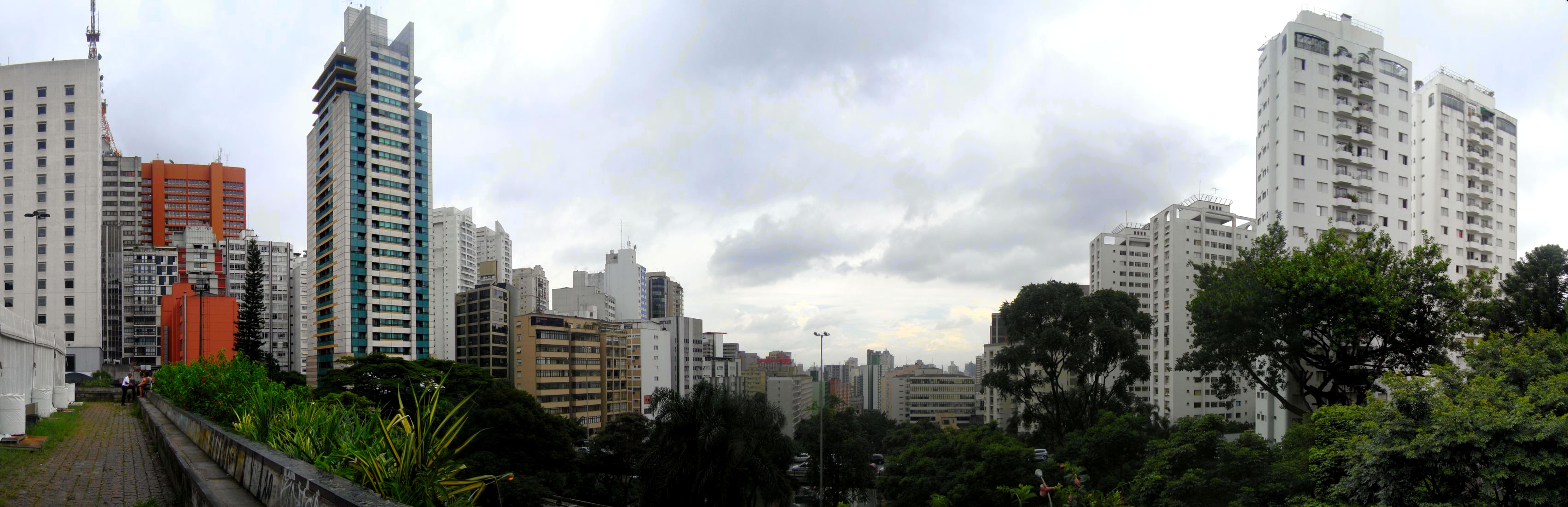 Panorama do distrito de Bela Vista, São Paulo SP. Atrás do MASP.